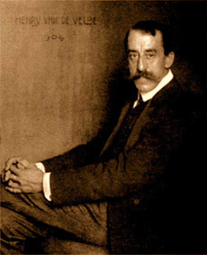 Porträt des Designers Henry van de Velde, 1904.